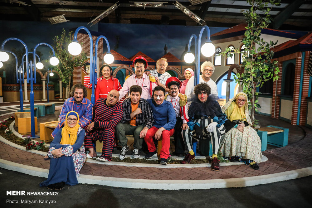 شخصیت های اصلی بچه محل از فصل 1-تاکنون